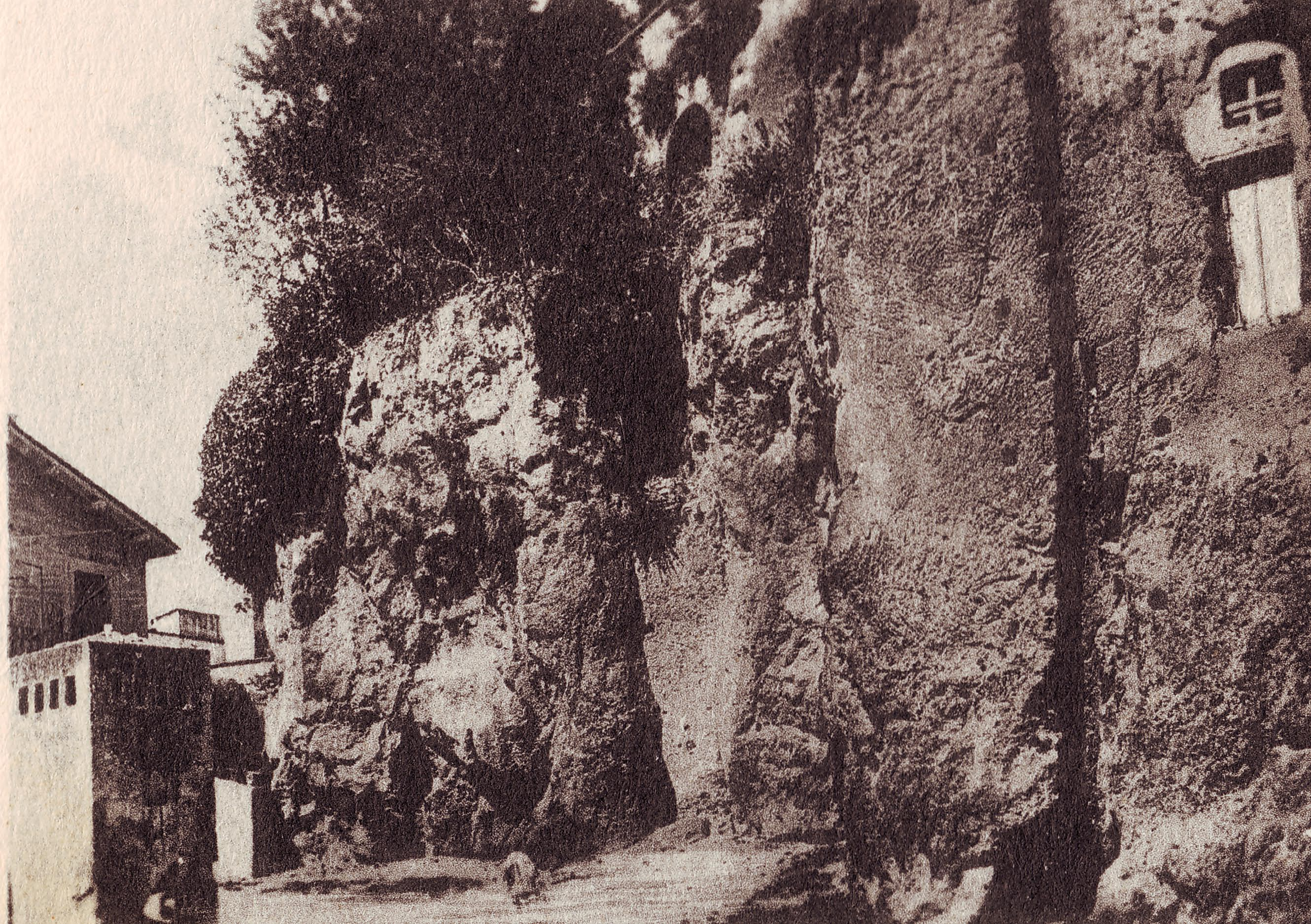 Тарпейская скала